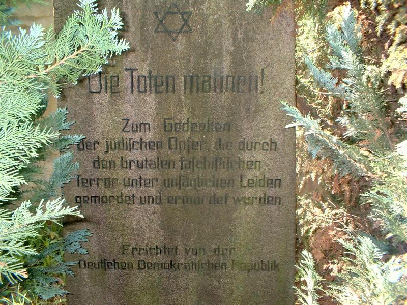 Die Inschrift des Gedenksteines auf dem jüdischen Friedhof in Ermsleben